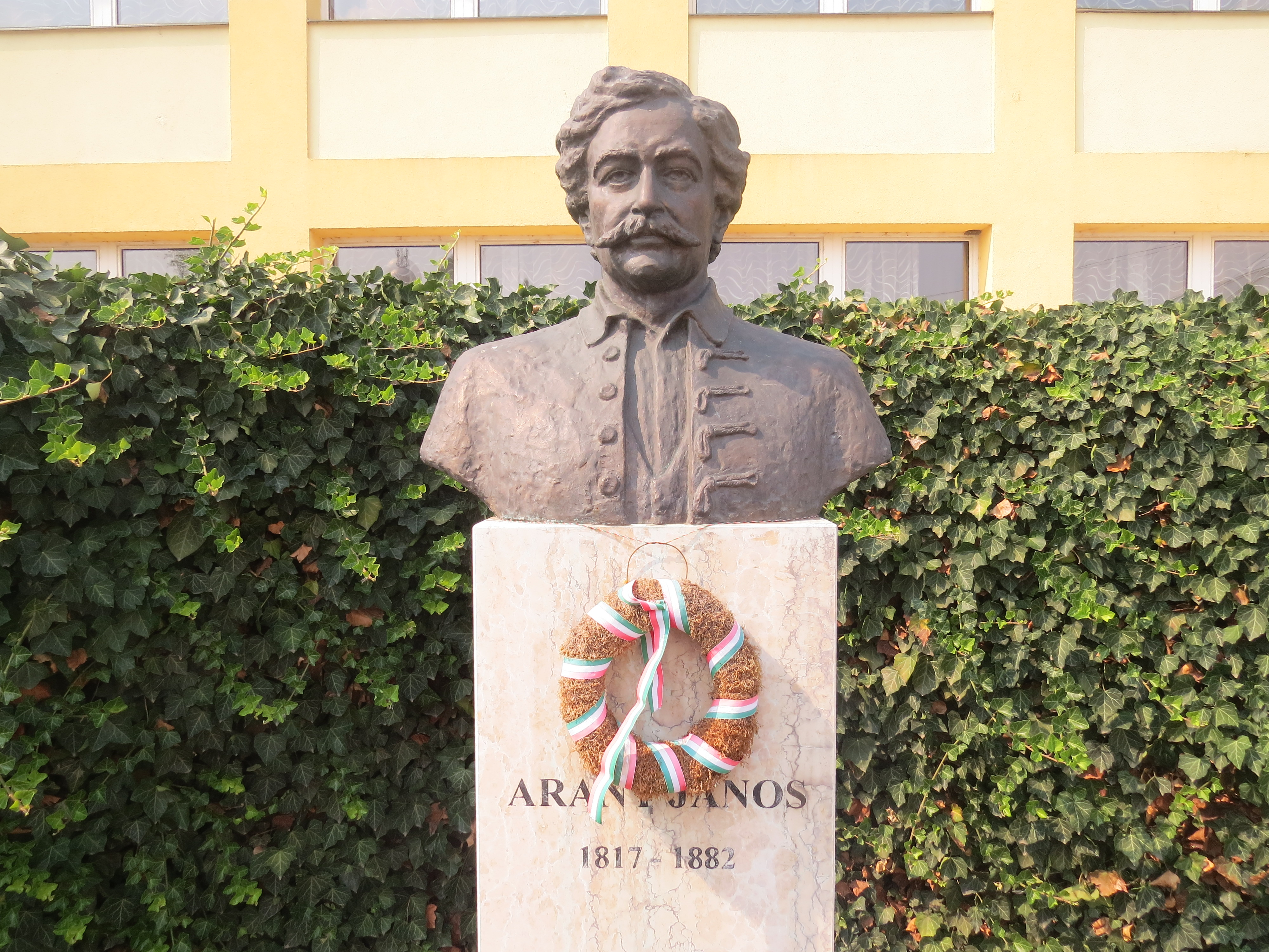 Arany János bronz mellszobra Kékcsén. Alkotója: Borsi Antal (2010).